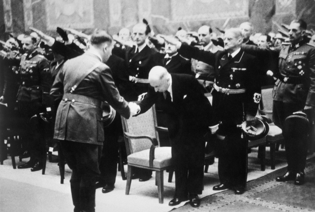 Adolf Hitler podává ruku Emilu Háchovi